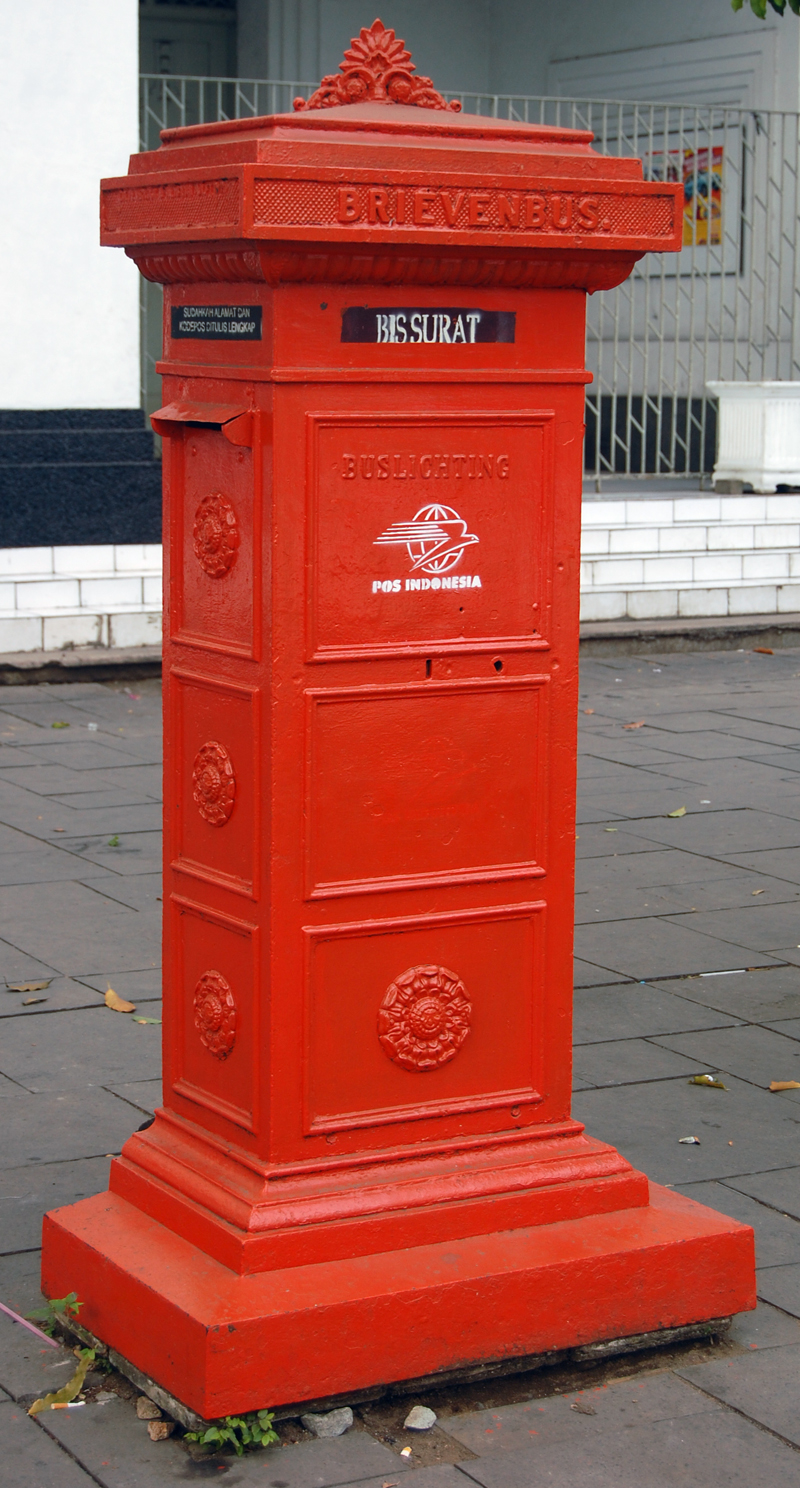 Contoh bis surat di Indonesia. Difoto di depan Museum Fatahillah.